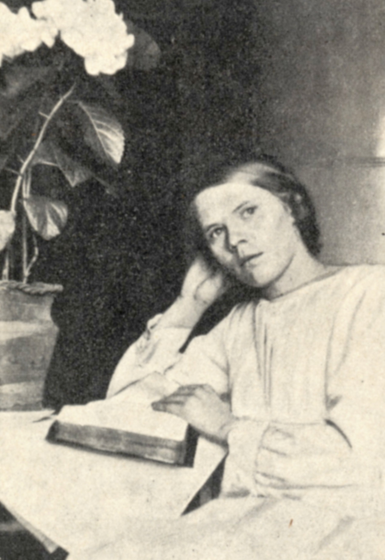 Description